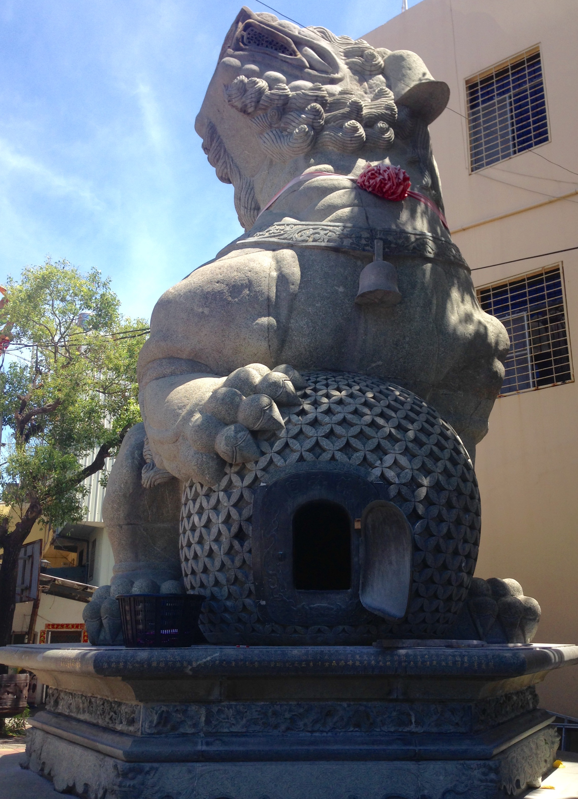 鎮海宮金爐